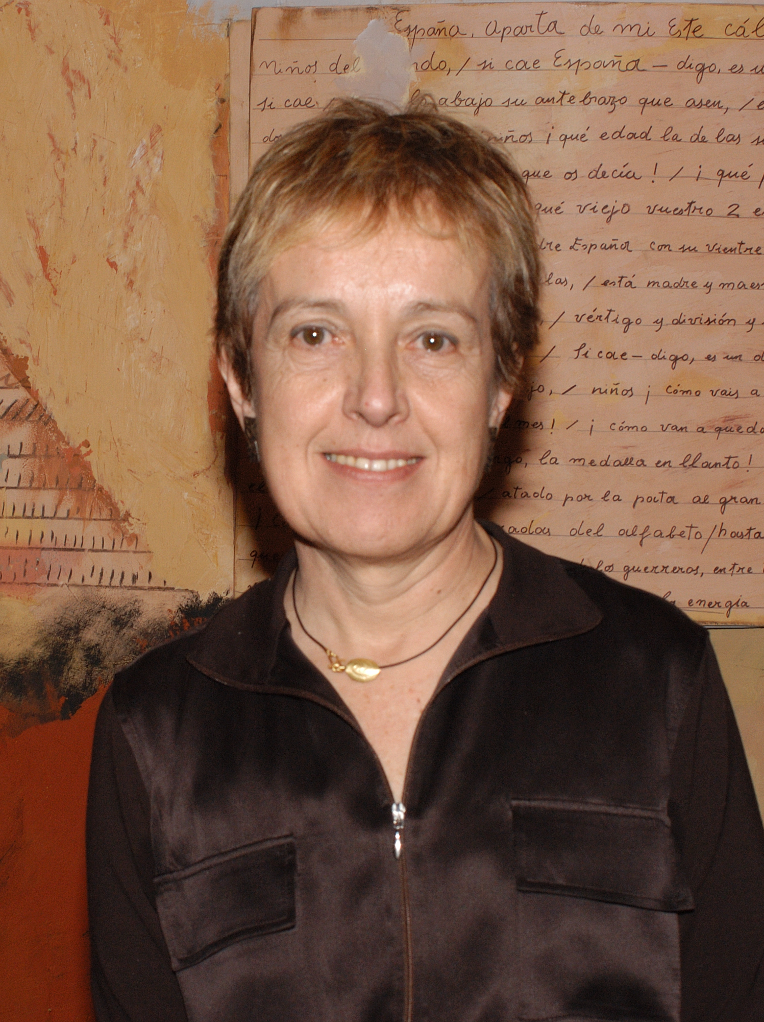 Caterina Mieras al MHC el 2004.